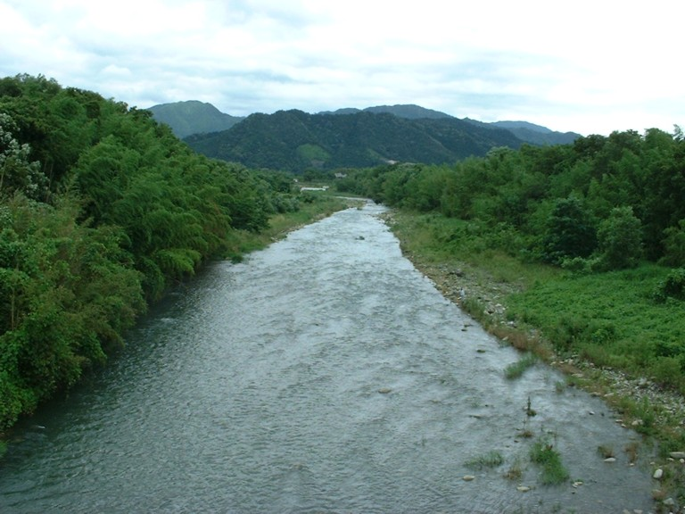 犬上川；福寿橋（国道307号）から上流方を望む 滋賀県犬上郡ja:甲良町・多賀町